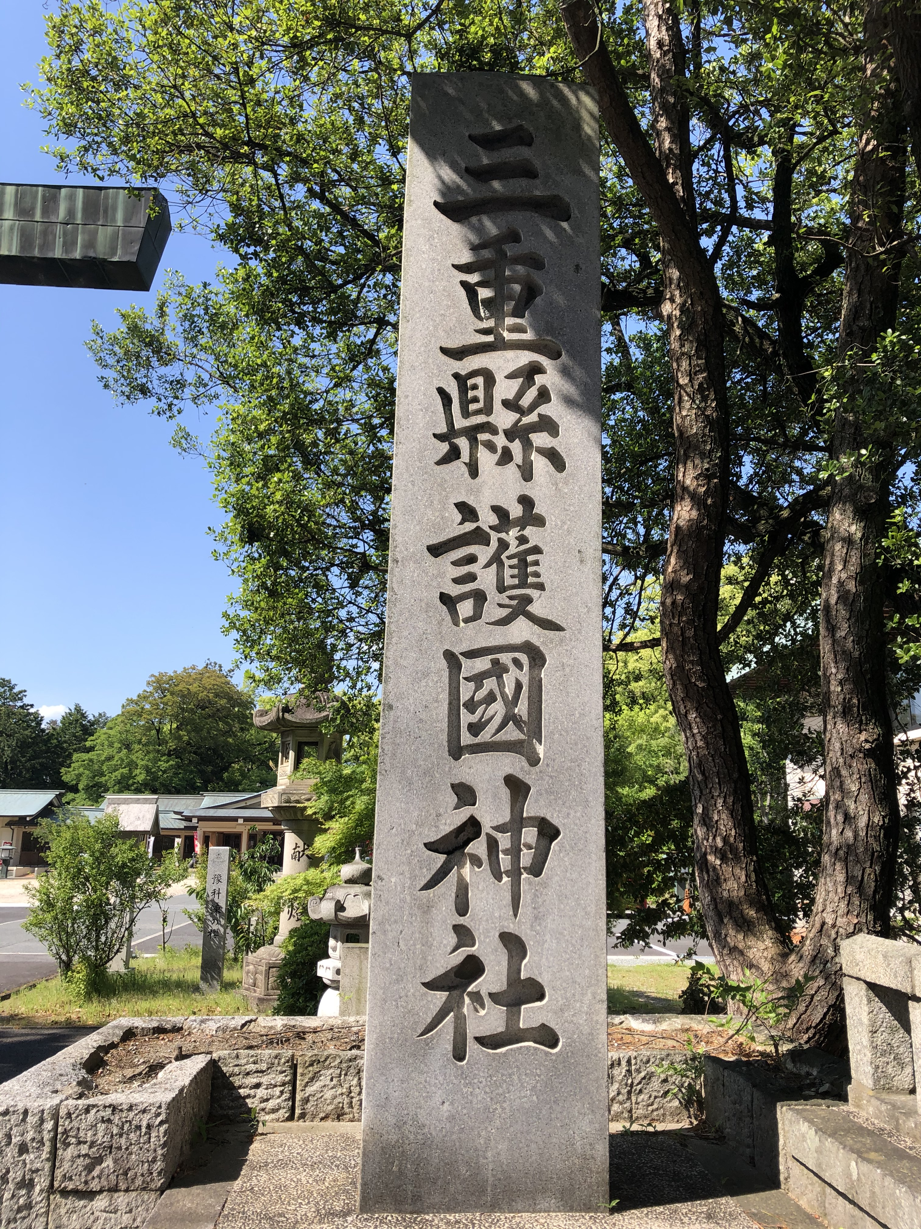 三重県護国神社